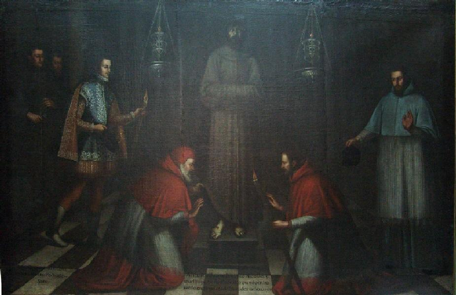 La obra representa al antipapa Nicolás V († 1333) contemplando el cuerpo incorrupto de San Francisco de Asís, el fundador de la Orden de los franciscanos.